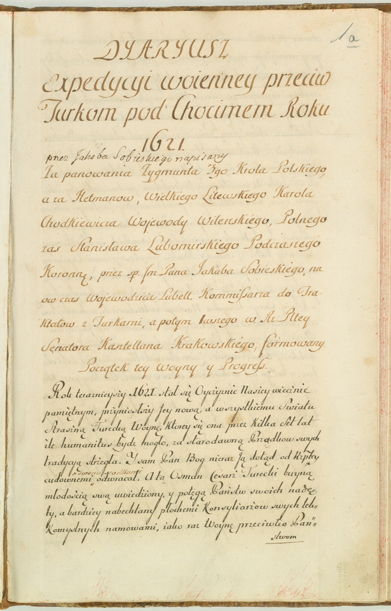 kopia z XVIII wieku Miejsce powstania: nieznane Druk/rękopis: rękopis Forma: kopia, czystopis